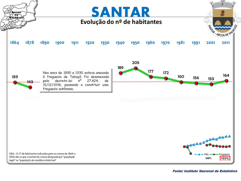 Censos 1864/2011